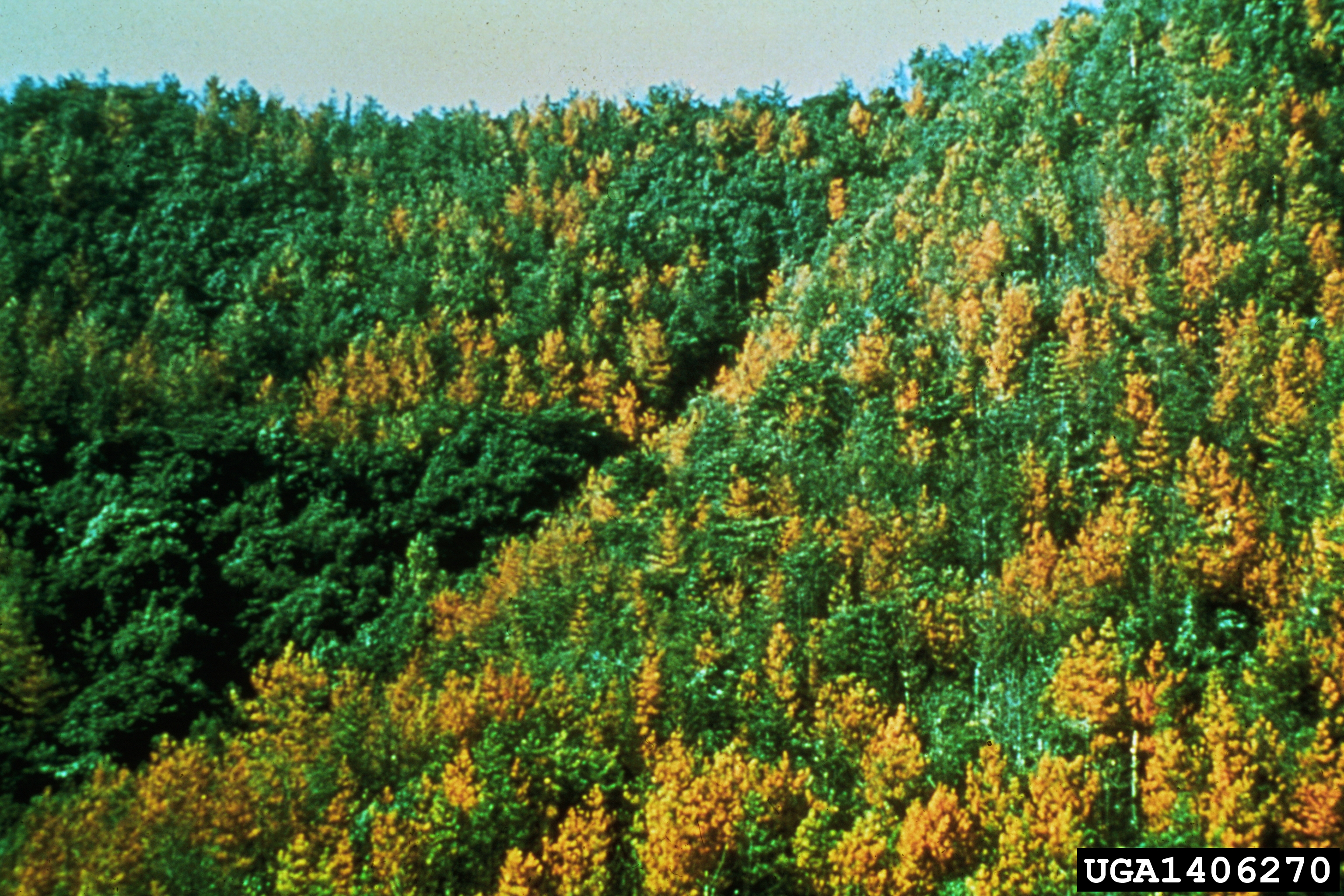 pine wilt nematode (Bursaphelenchus xylophilus) (Steiner & Buhrer) Nickle. Damage on Japanese red pine (Pinus densiflora Siebold & Zucc.